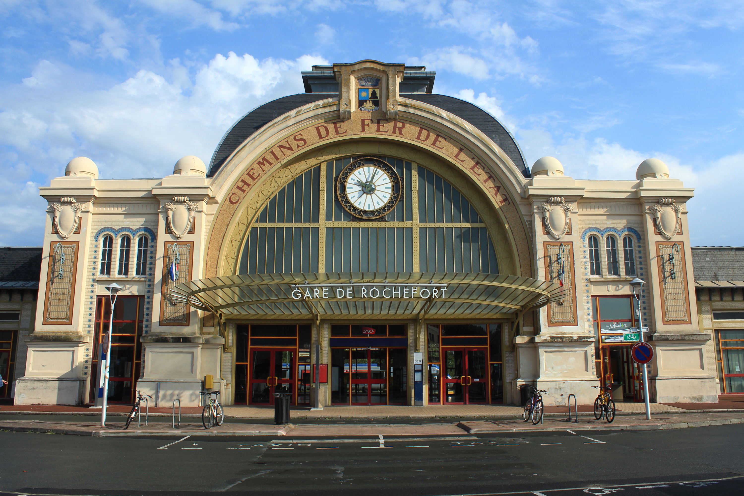 Bâtiment voyageurs de la gare de Rochefort.